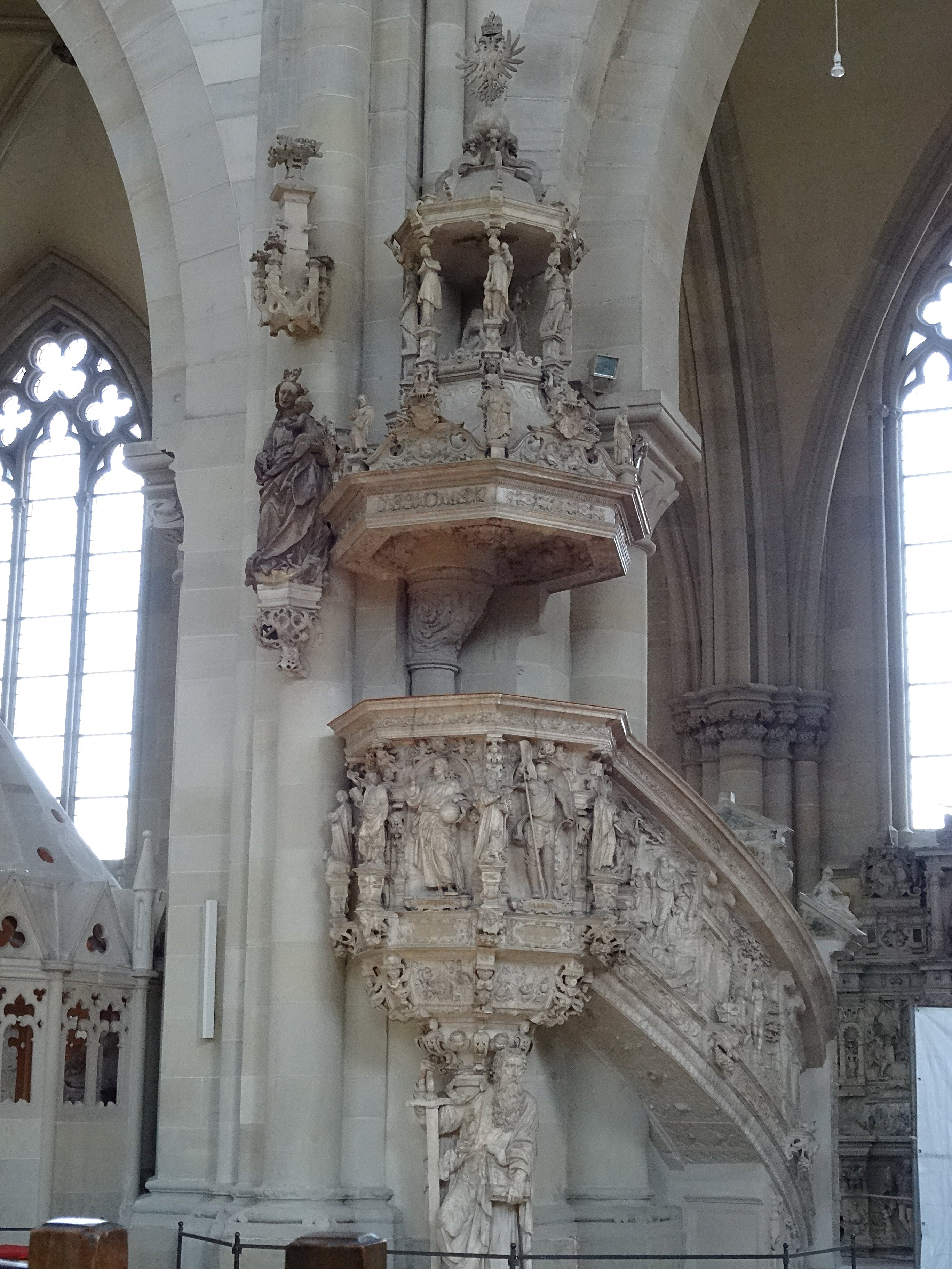 Spätrenaissance-Kanzel aus Alabaster von Christoph Kapup (1597) im Magdeburger Dom. Auf dem Kanzelkorb sind dargestellt: Hl. Johannes der Täufer, Christus als Erlöser, Hl. Mauritius, Hl. Katharina. Er wird gestützt vom Hl. Paulus als Kanzelkorbträger. Auf der Kanzeltreppe sind dargestellt: Gott mit Adam und Eva im Paradies, der Sündenfall, die Sintflut.